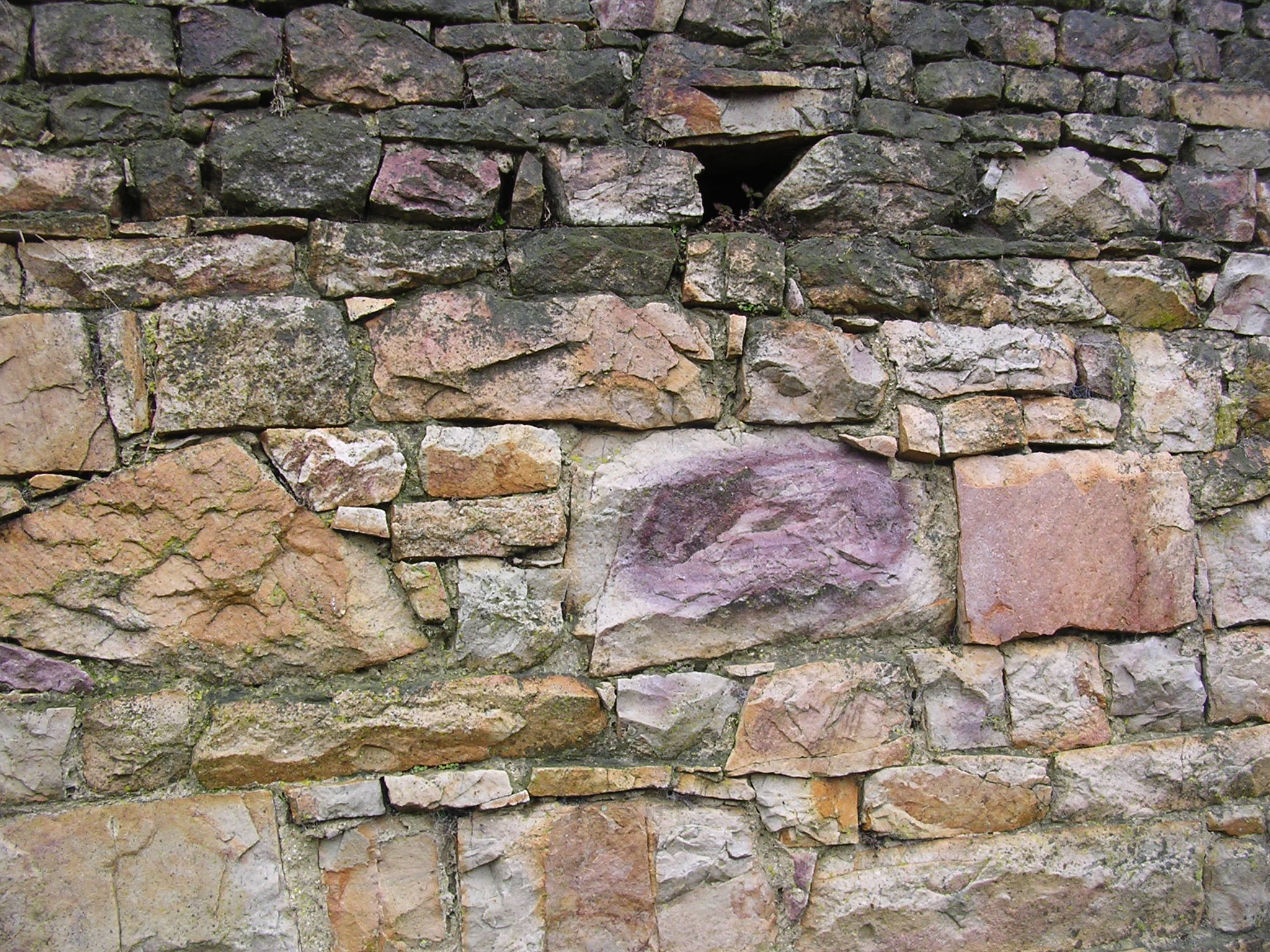 Le Grès rose de Sainte-Suzanne (Mayenne) / remparts